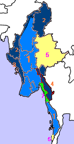 carte lingustique du Myanmar 2 modifiée